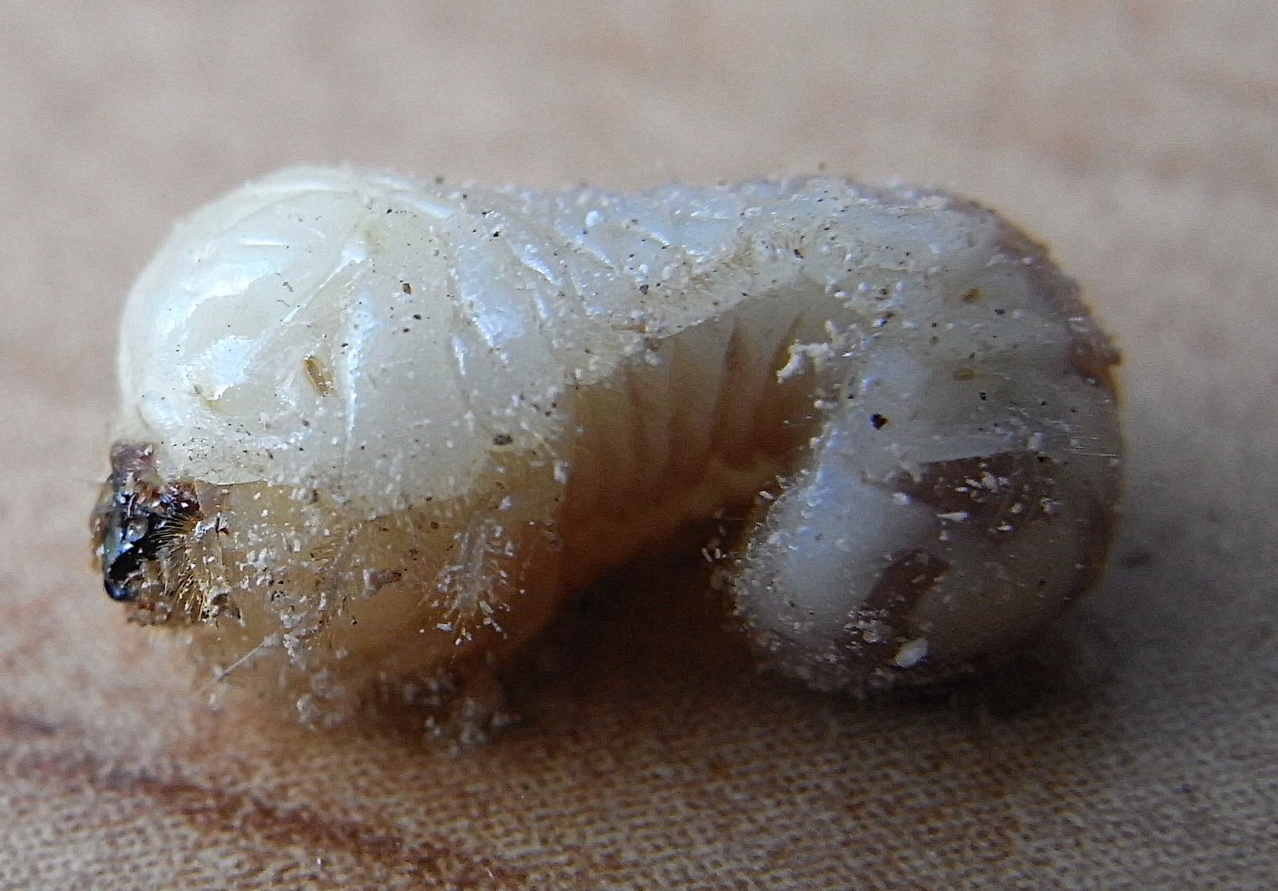 Larve von Bostrichus capucinus Ricoh R8